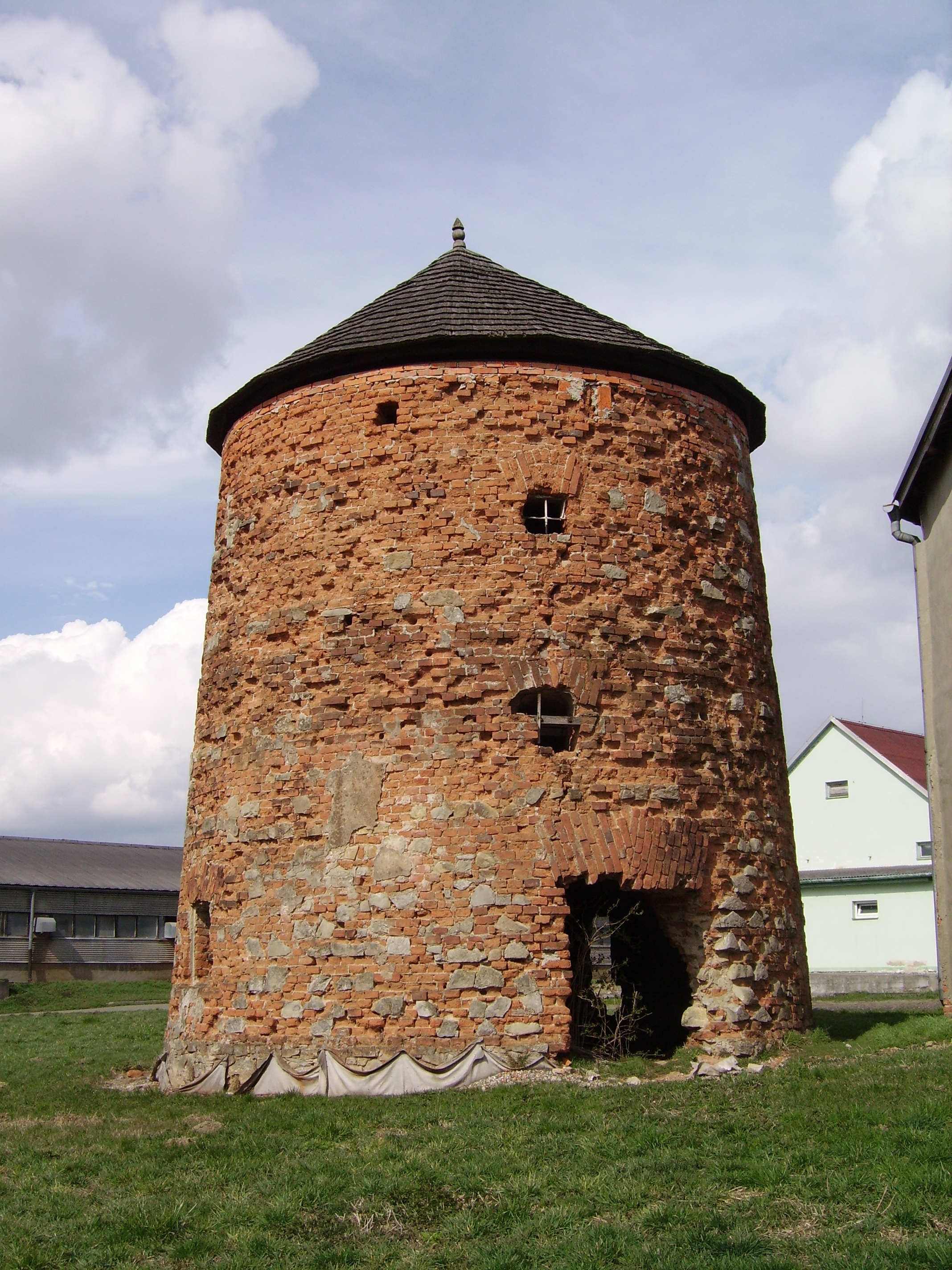 Windmill_Poruba02.JPG